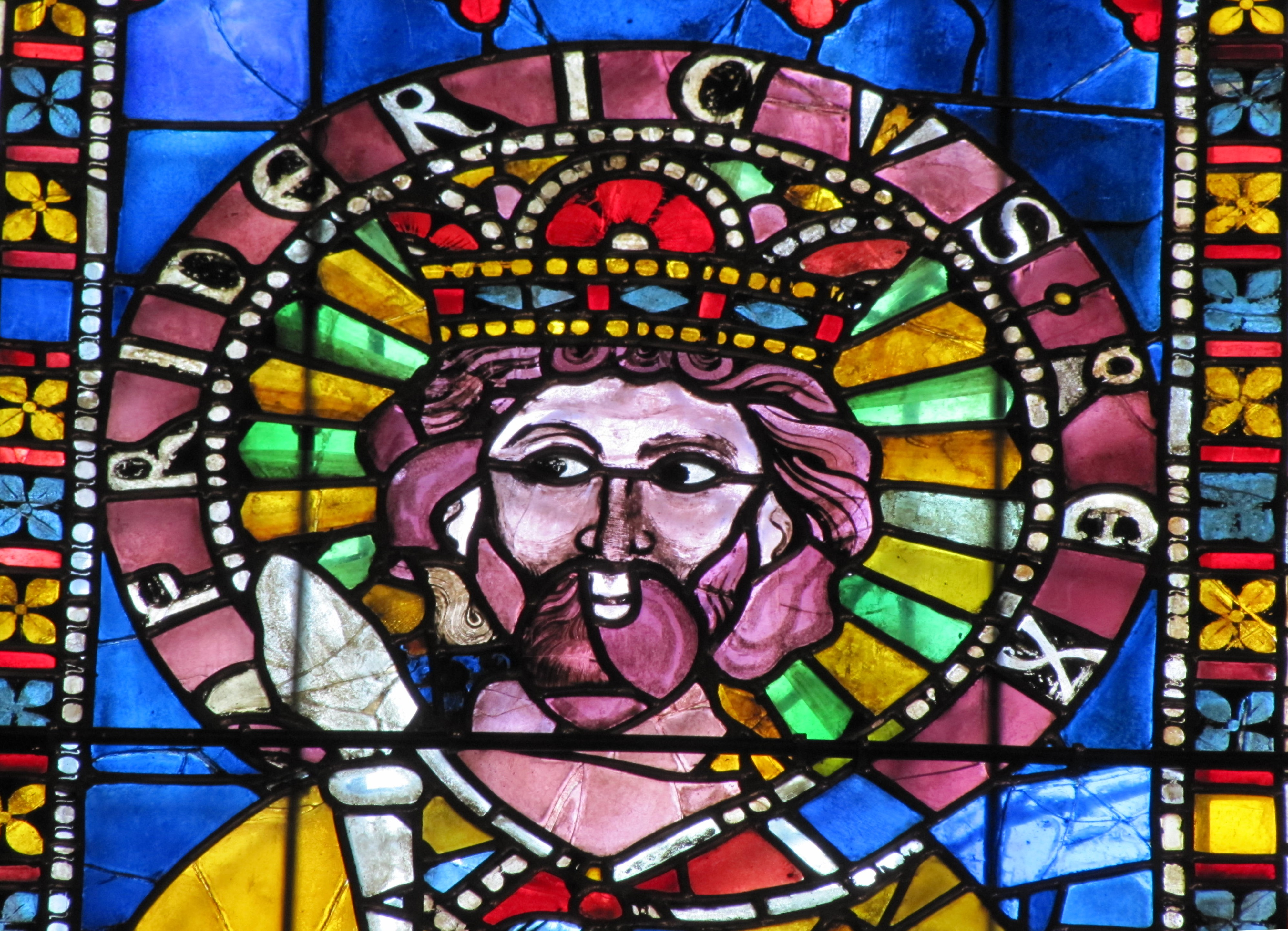 Alsace, Bas-Rhin, Cathédrale Notre-Dame de Strasbourg (PA00085015). Bas-côté nord, Verrière (1210-1270) "Empereurs Saint-Empire": Frédéric Barberousse de Hohenstaufen